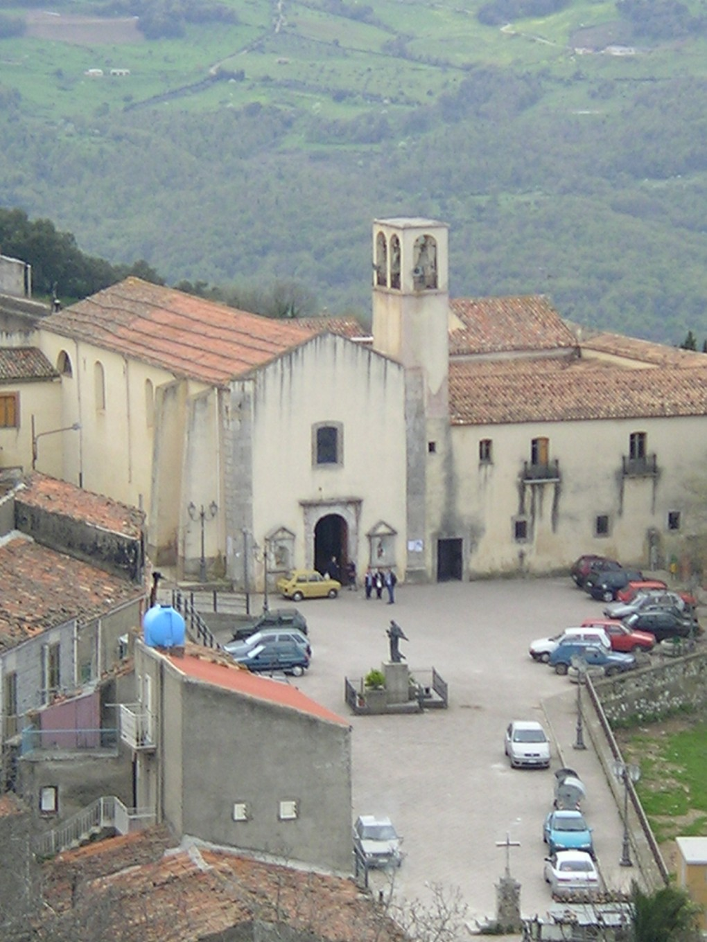 San Fratello, Santuario di san Benedetto il Moro e Convento di San Francesco